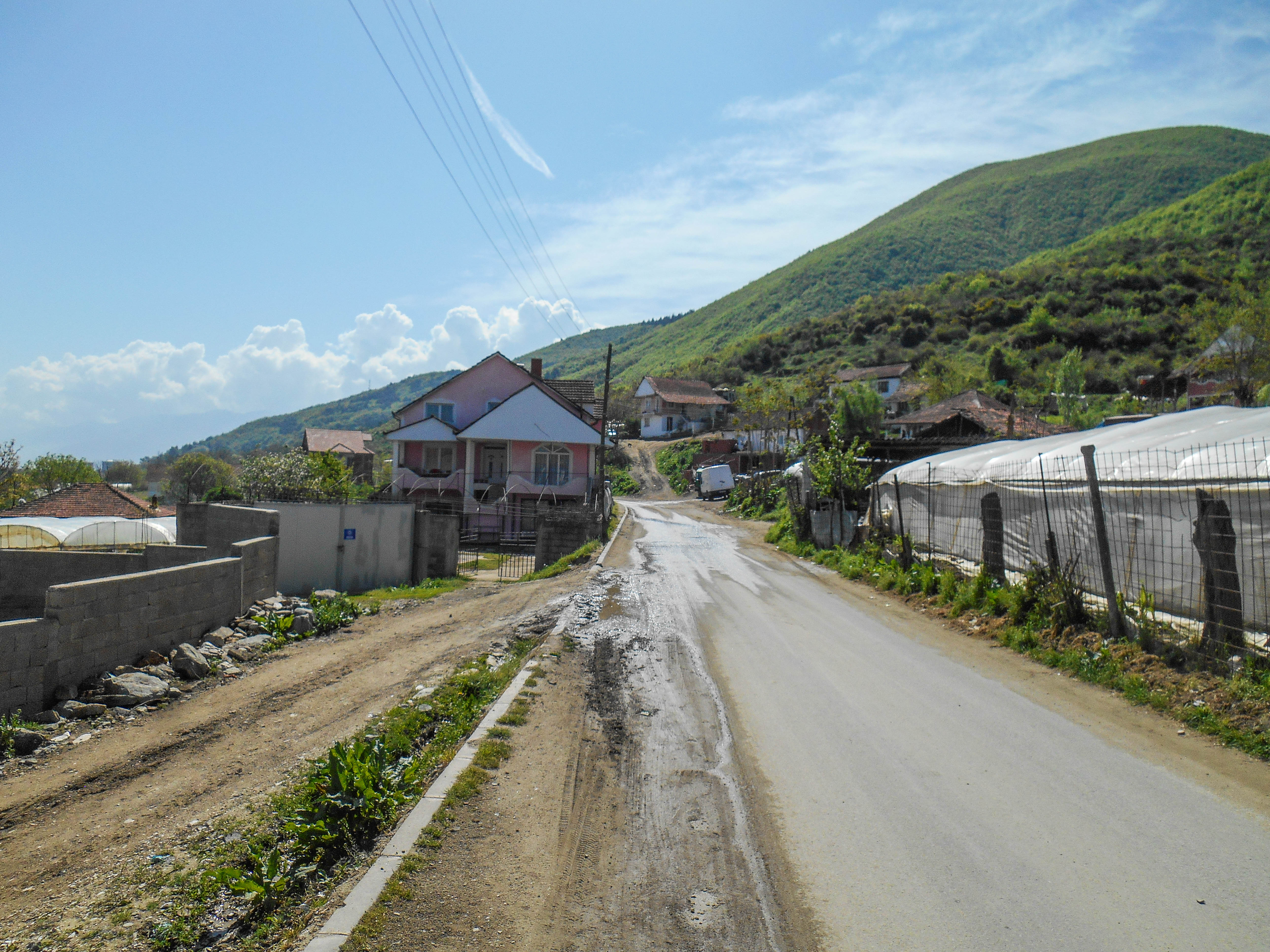 Баница, Струмица